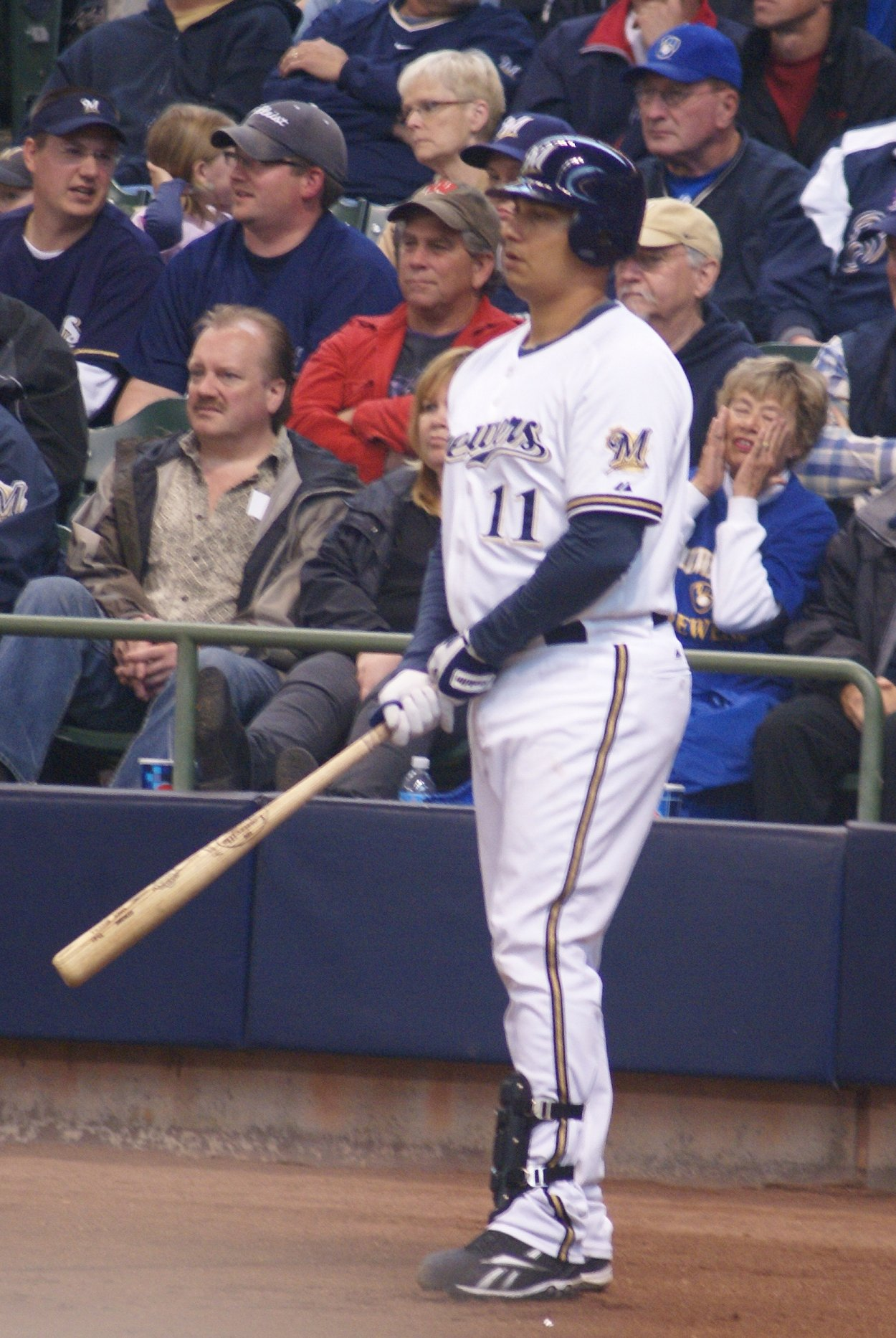 Mike Rivera